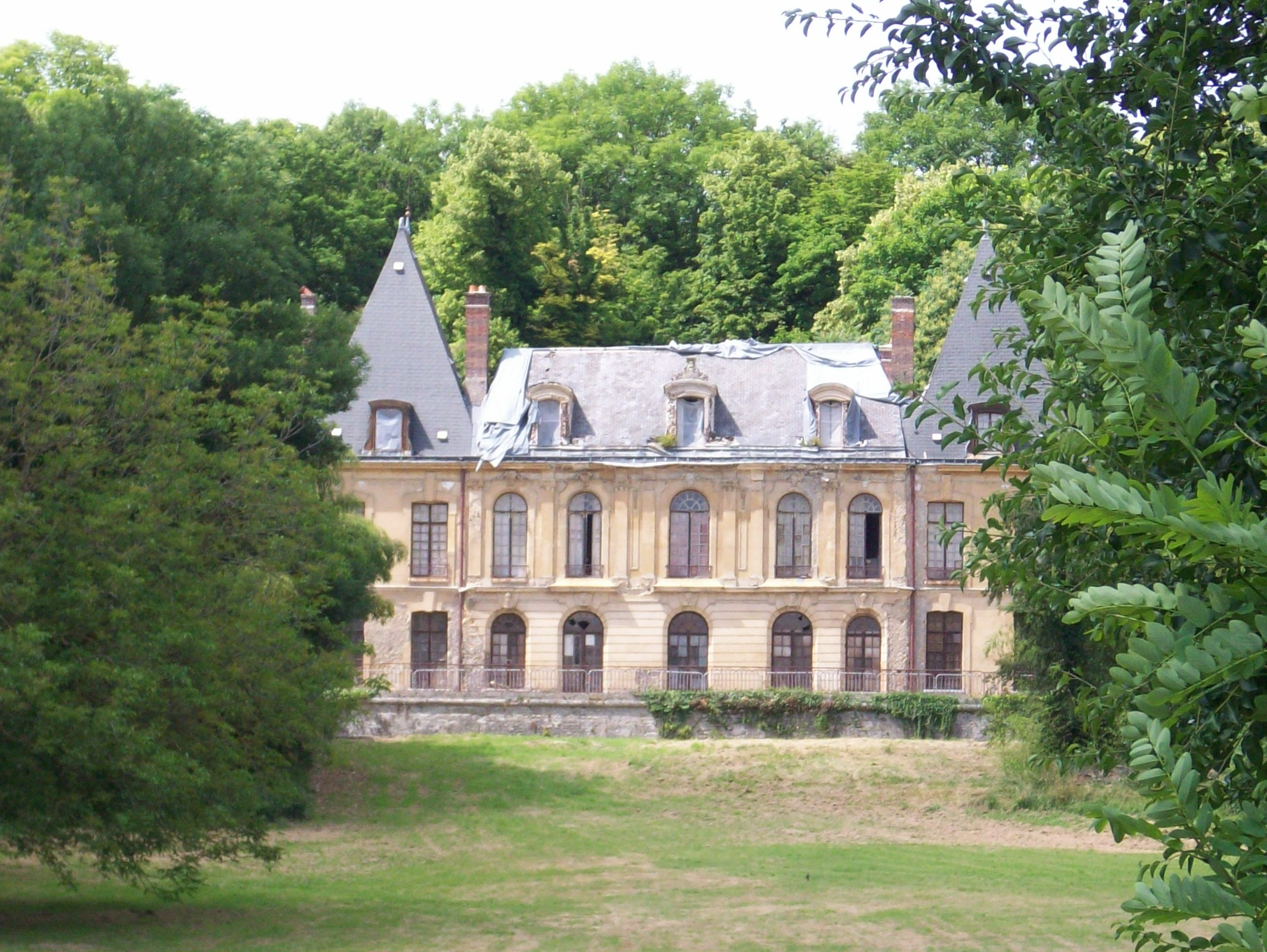 Le château d'Issou (Yvelines, Île-de-France, France).